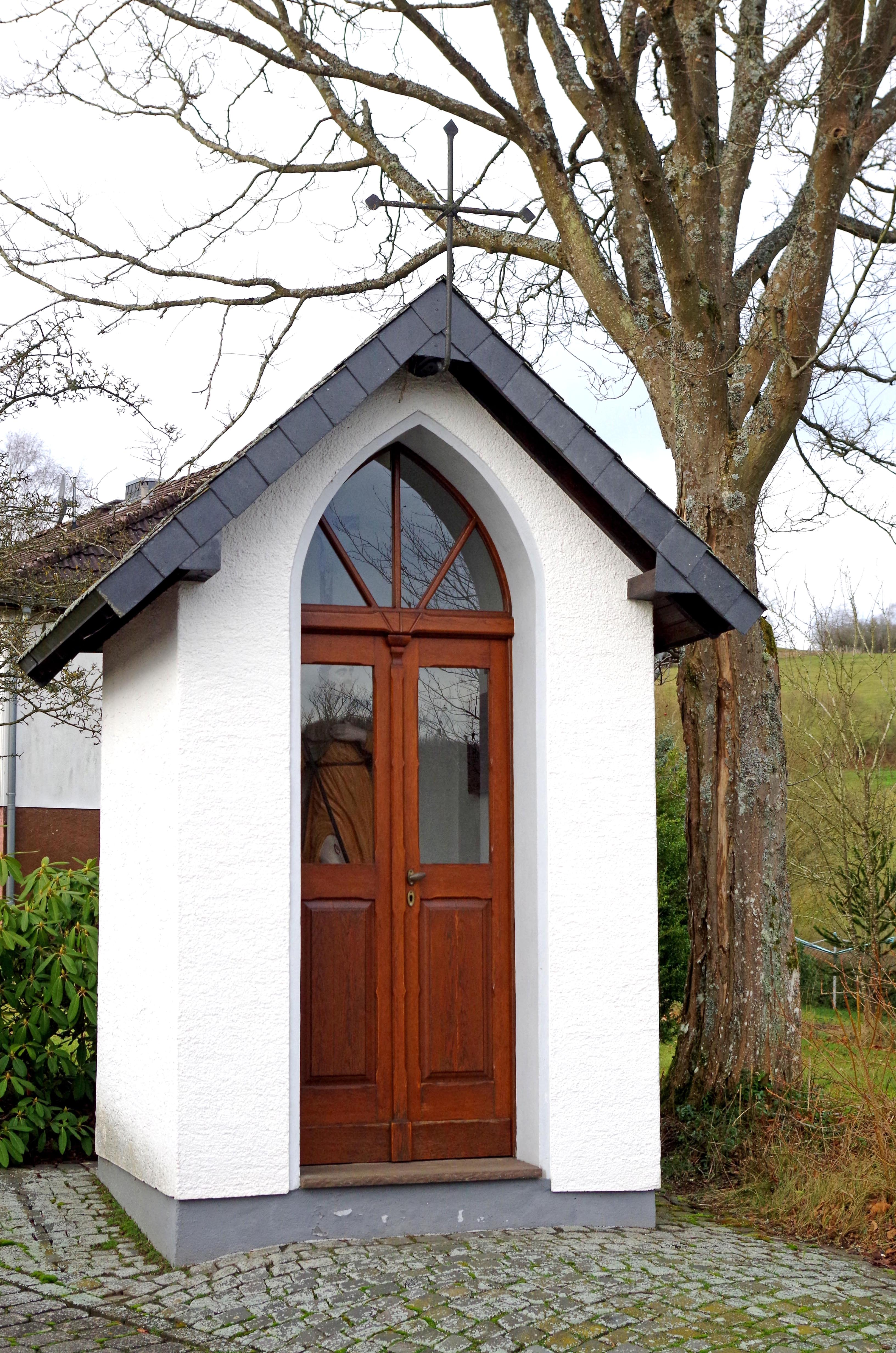 Sieberath, Rochuskapelle